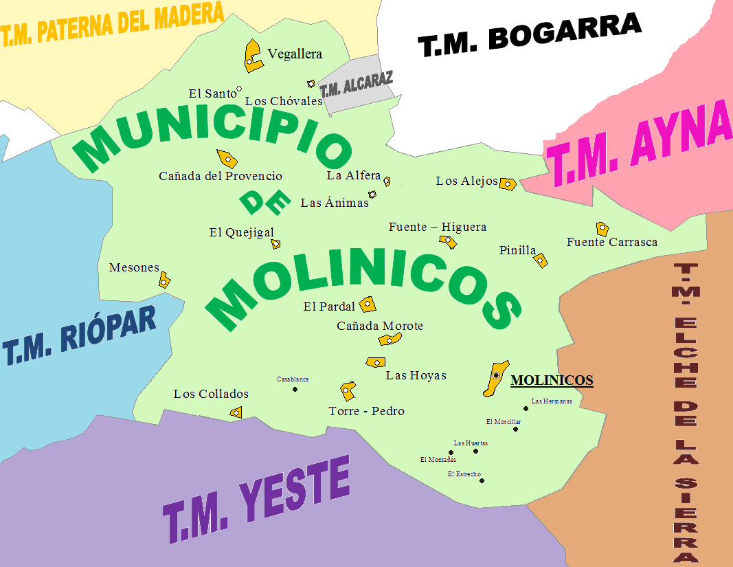 Mapa con la relación de los municipios limítrofes con el de Molinicos (Albacete), y la relación de las localidades que conforman el mismo.